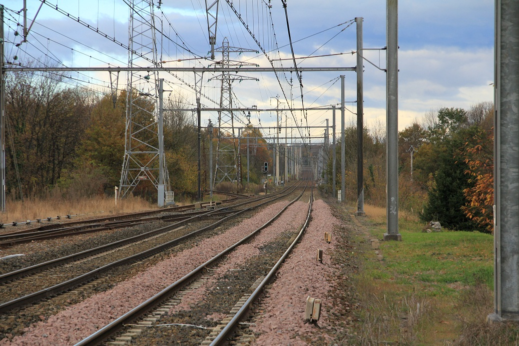 Vue de la voie en direction de Tarbes en gare de Lannemezan en novembre 2010, Hautes-Pyrénées, France.